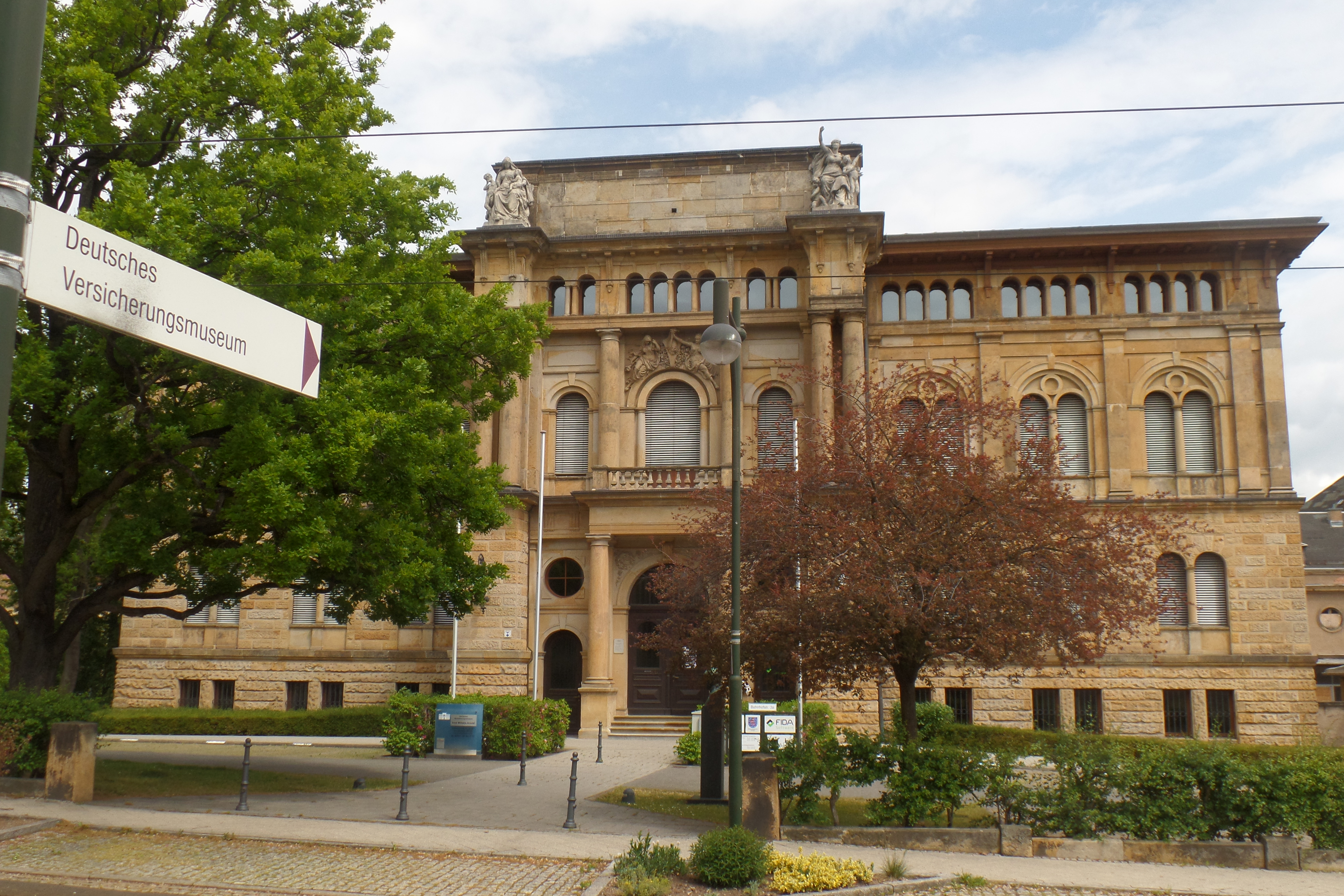 Im ehemaligen Gebäude der Gothaer Lebensversicherungsbank hat heute auch das Deutsche Versicherungsmuseum E.W. Arnoldi seinen Sitz.